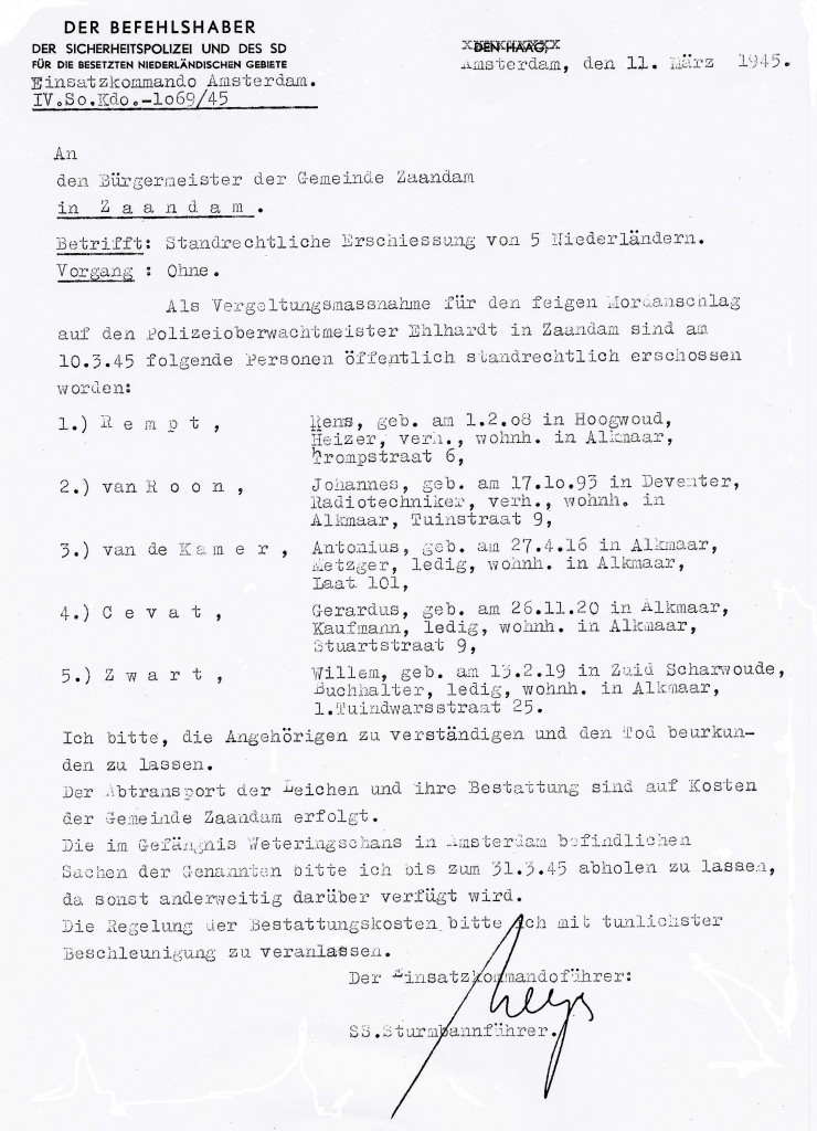 De Zaanse liquidaties: Willem Nicolaas Ehlhardt